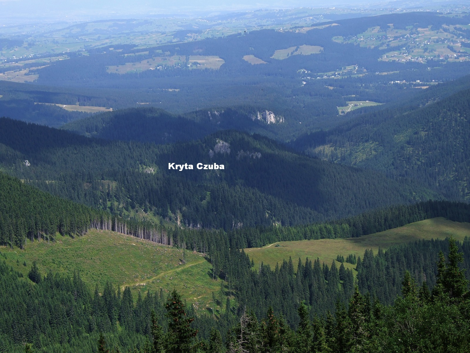 Widok z Bobrowca na polanę Jaworzyna pod Furkaską i dolną część Doliny Chochołowskiej